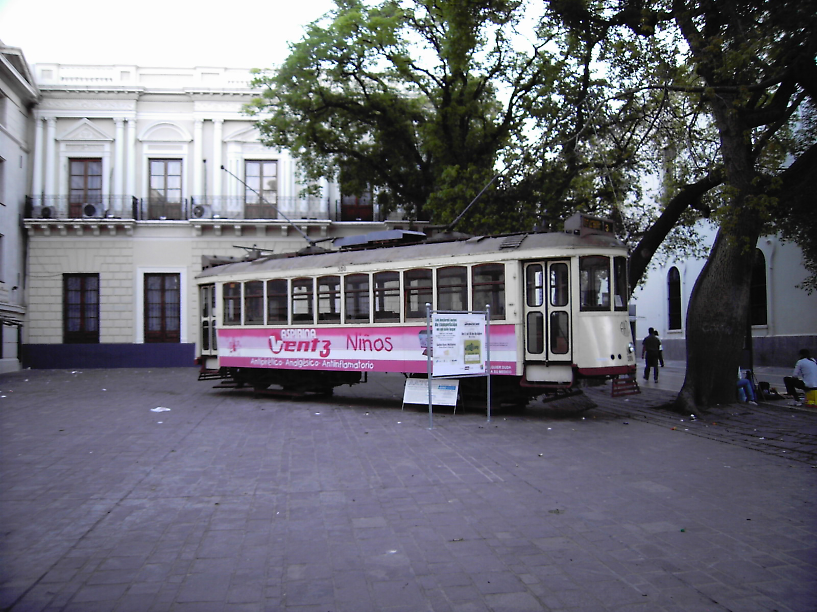 Tranvía viejo en Córdoba, Argentina.